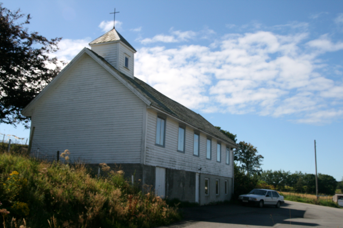 Vestre Åmøy kapell